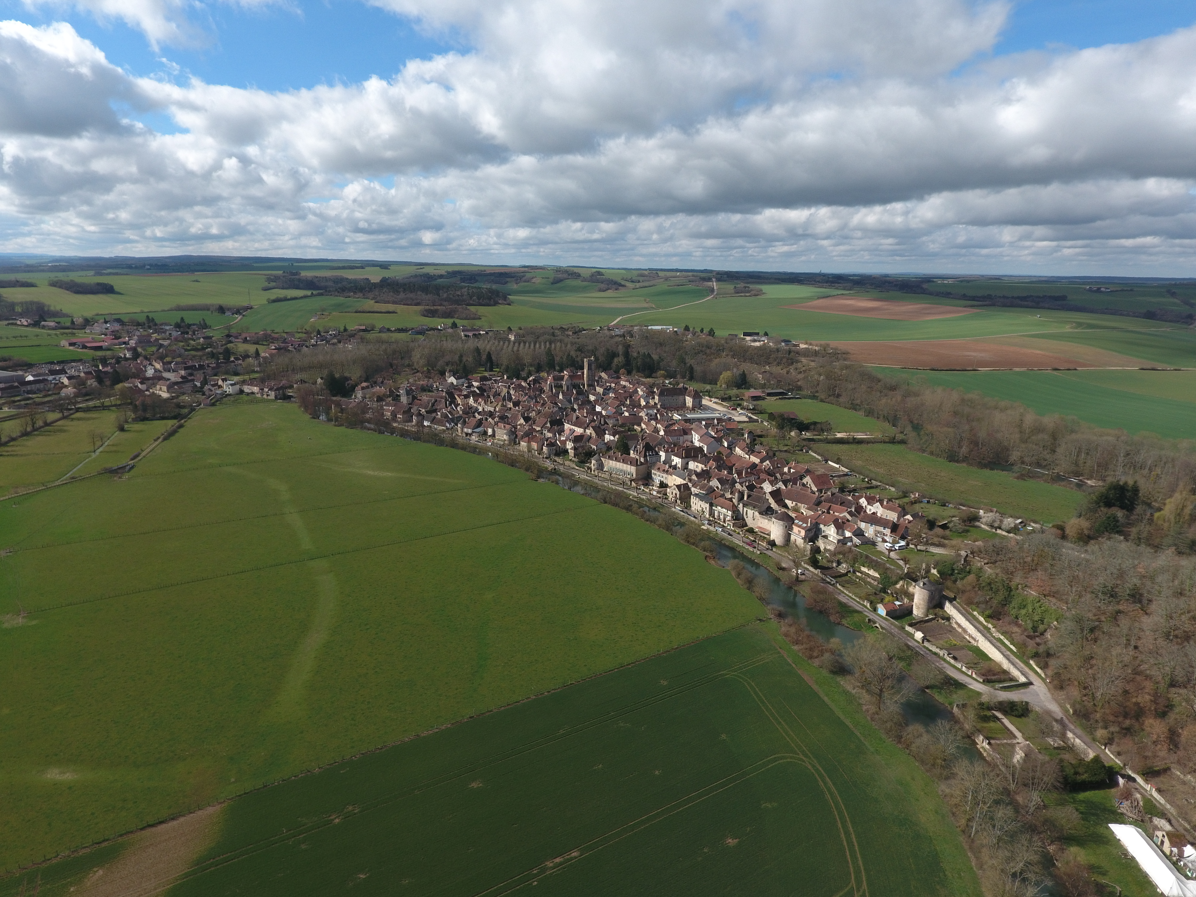 Vue de Noyers